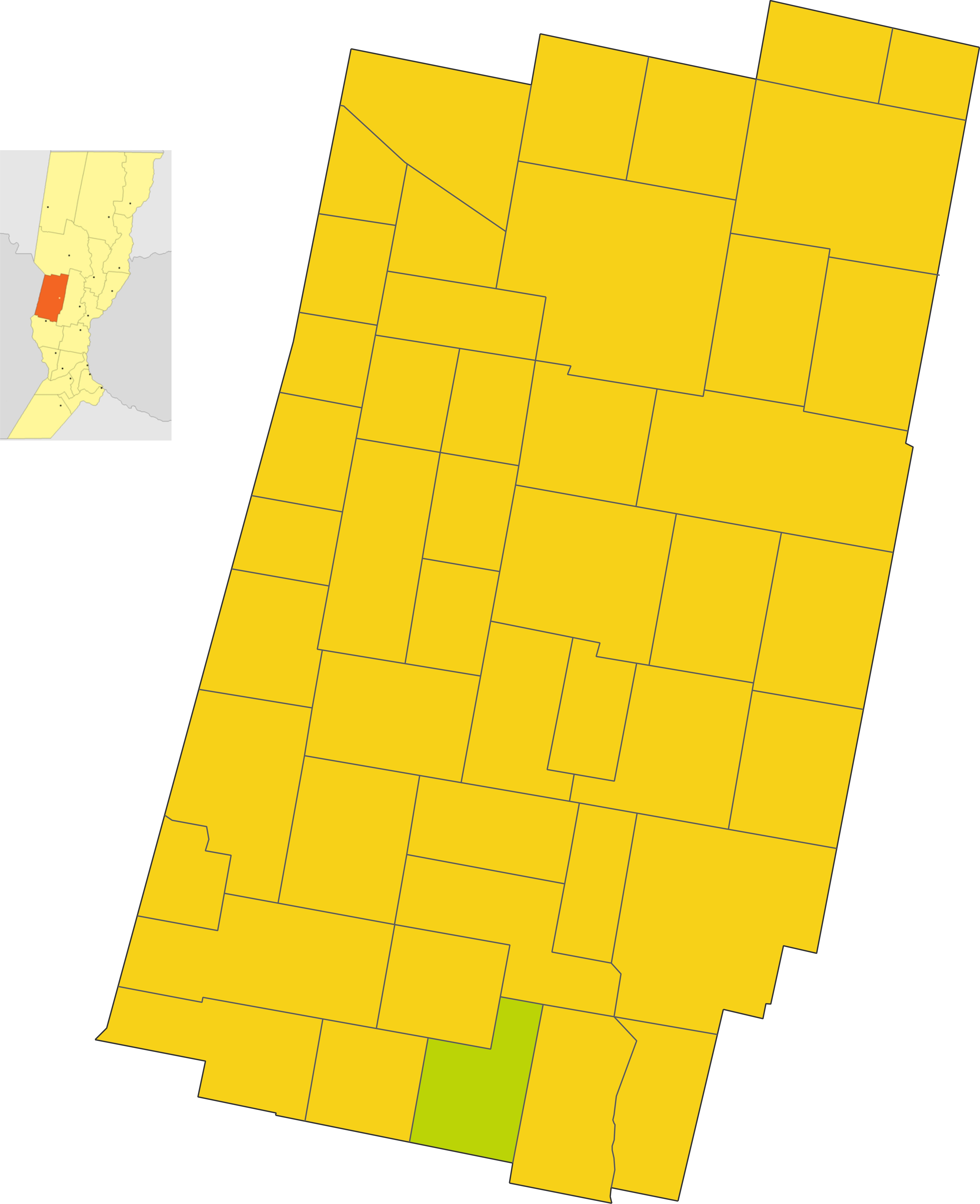 Map of the comuna de Maria Juana in Castellanos department, Santa fe province, Argentina